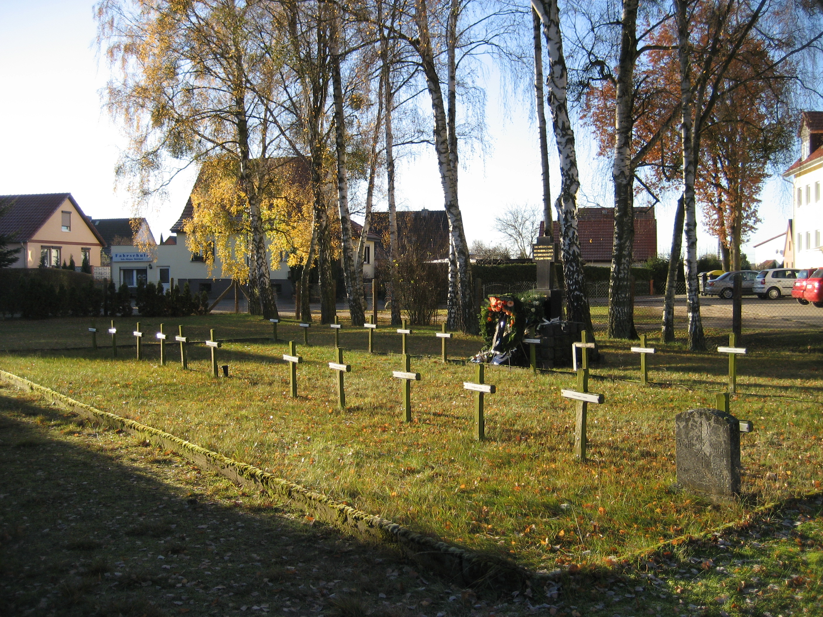 Deutsches Soldatengräberfeld auf dem Löcknitzer Friedhof, Blickrichtung Kopfseite mit Gedenkstein.